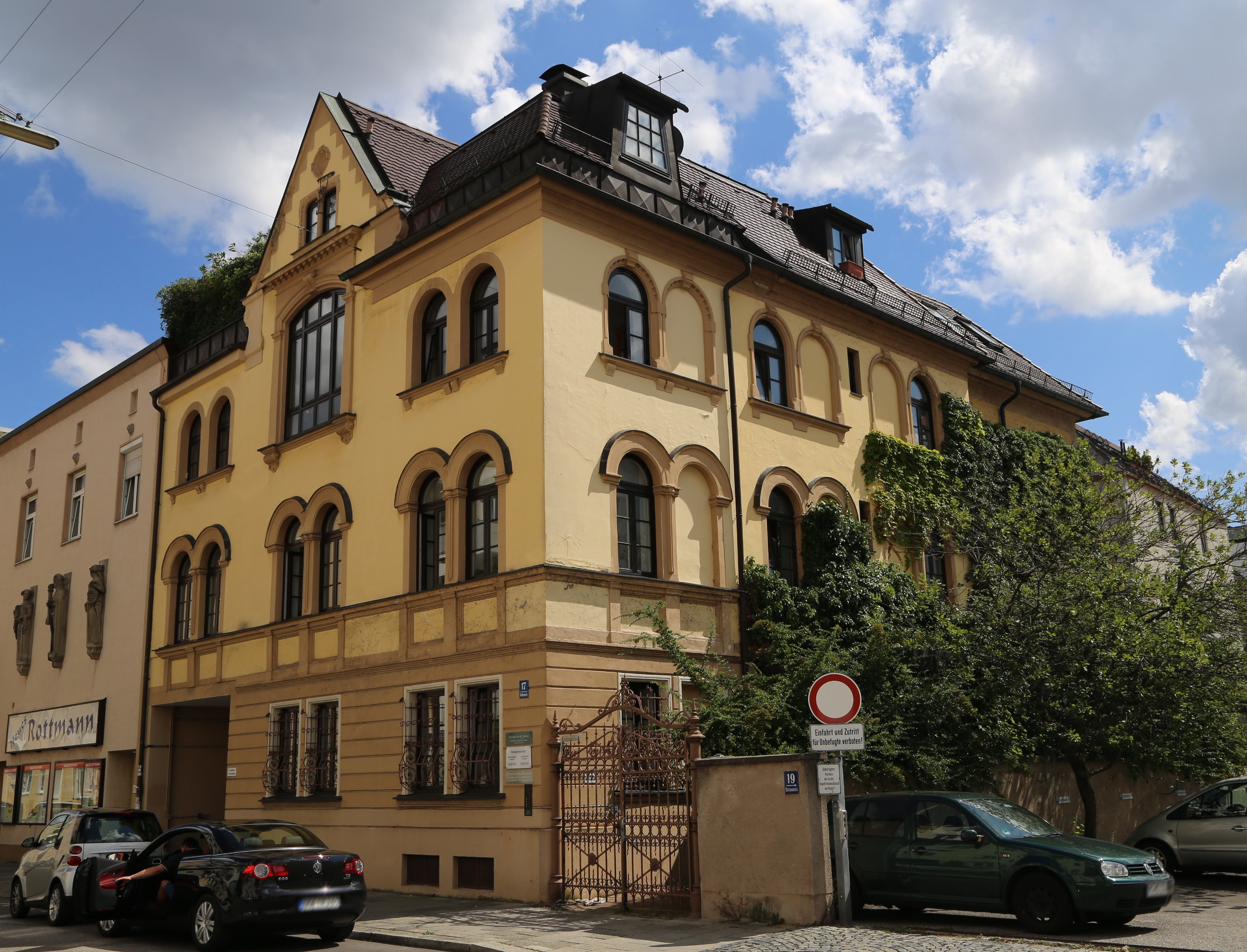 Rottmannstraße 17; Mietshaus, malerisch, in romantisch abgewandelten Renaissanceformen, mit Atelier und Giebel, um 1860/70.